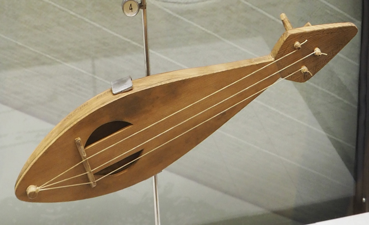 Реконструкция Н. Л. Кривоноса. Смык (Гудок). Новгород, XII век. Российский национальный музей музыки.